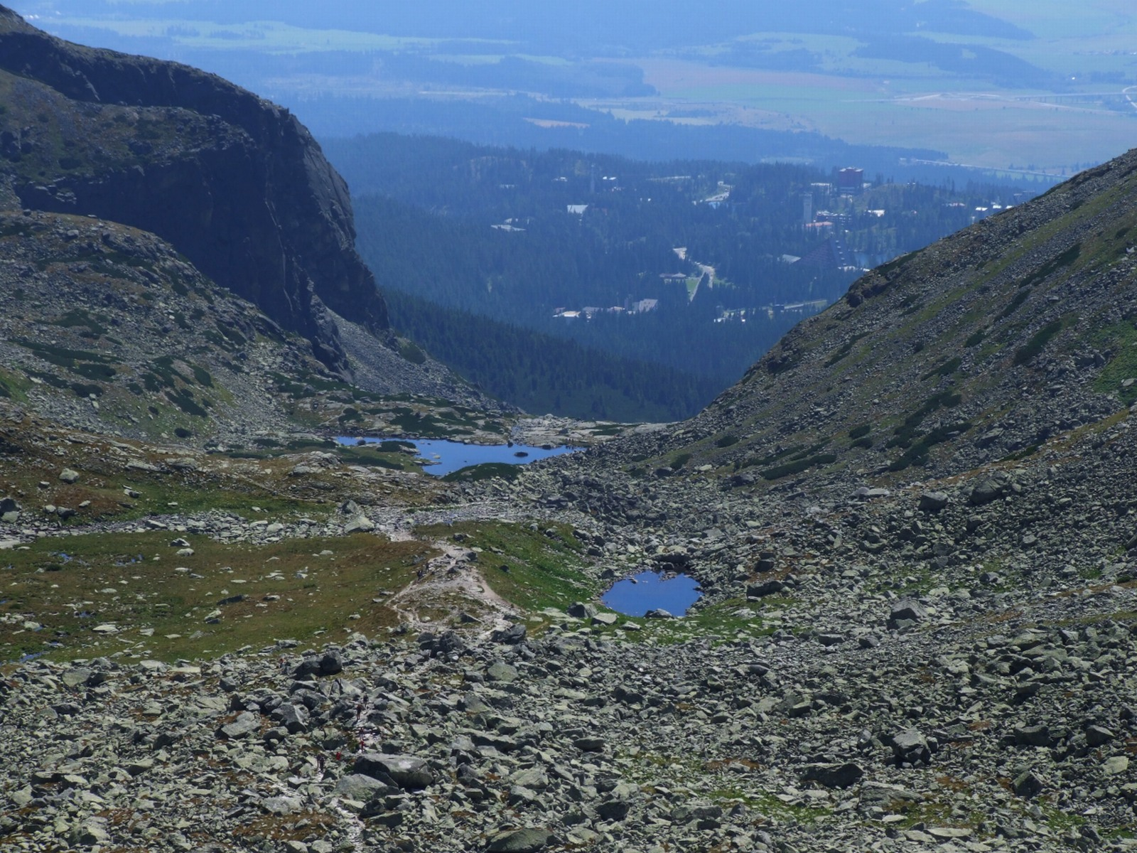 Dolina Młynicka (Tatry Wysokie). Nižné Volie pliesko, Pleso nad Skokom